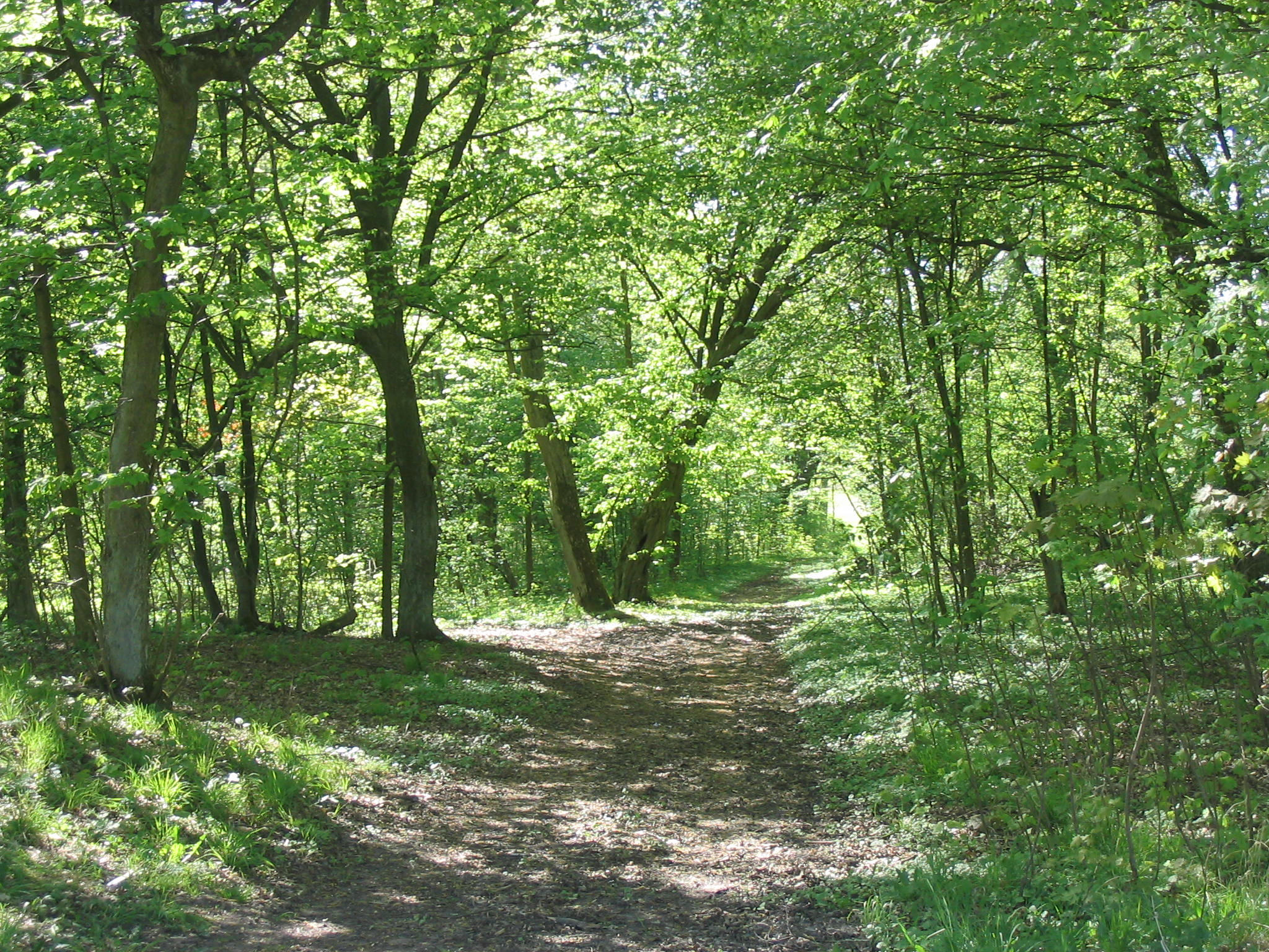 Garbno (gmina Barciany), pozostałości po dawnym parku dworskim, obok dawnego pałacu